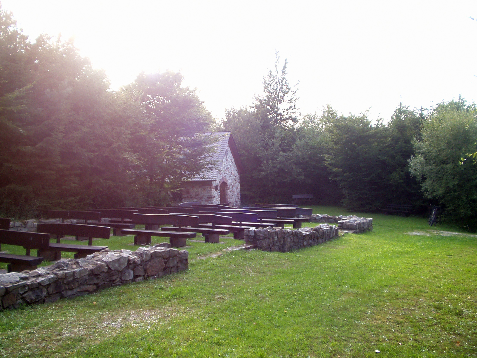 Die wiederaufgebaute Eremitage Maria Reizenborn, im Vordergrund die Grundmauern der restaurierten Wallfahrtskirche.